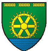 Wappen von Wimpassing im Schwarzatale